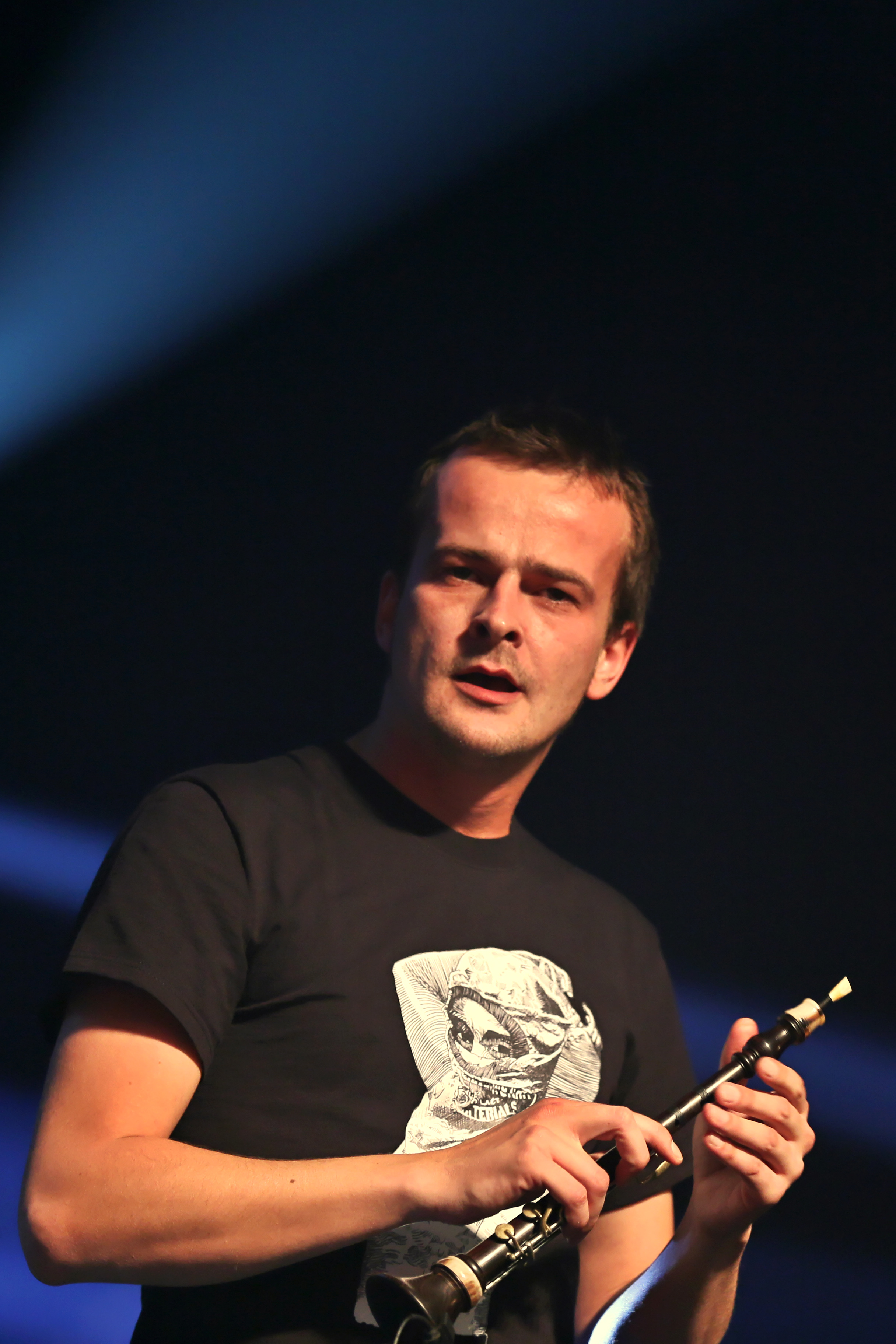 Startijenn en fest-noz lors du festival Yaouank le 21 novembre 2015 au Parc des Expositions de Rennes.